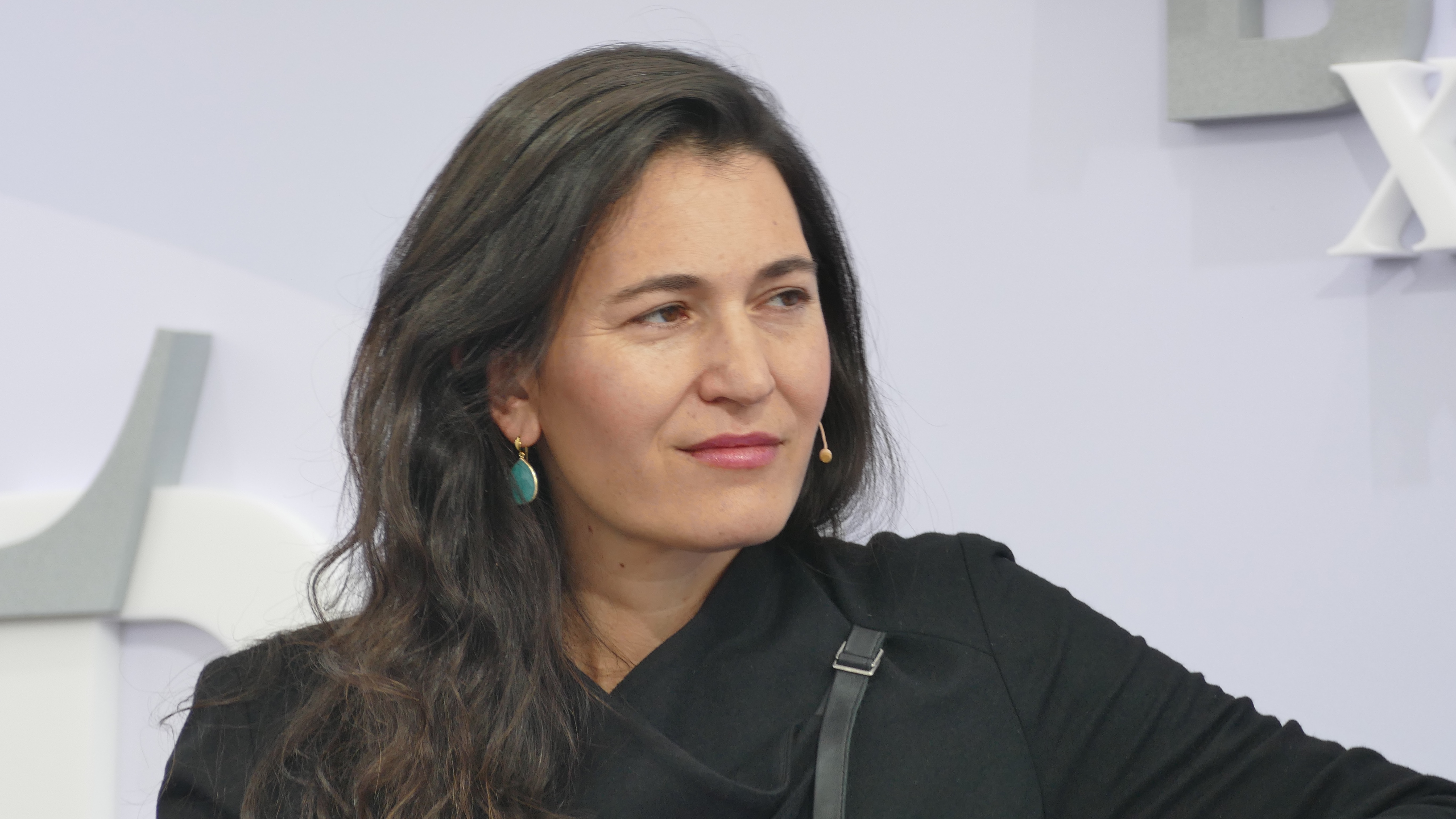 Die Schriftstellerin Nicole Krauss auf der Leipziger Buchmesse 2018 bei der Vorstellung ihres Romanes "Waldes Dunkel"